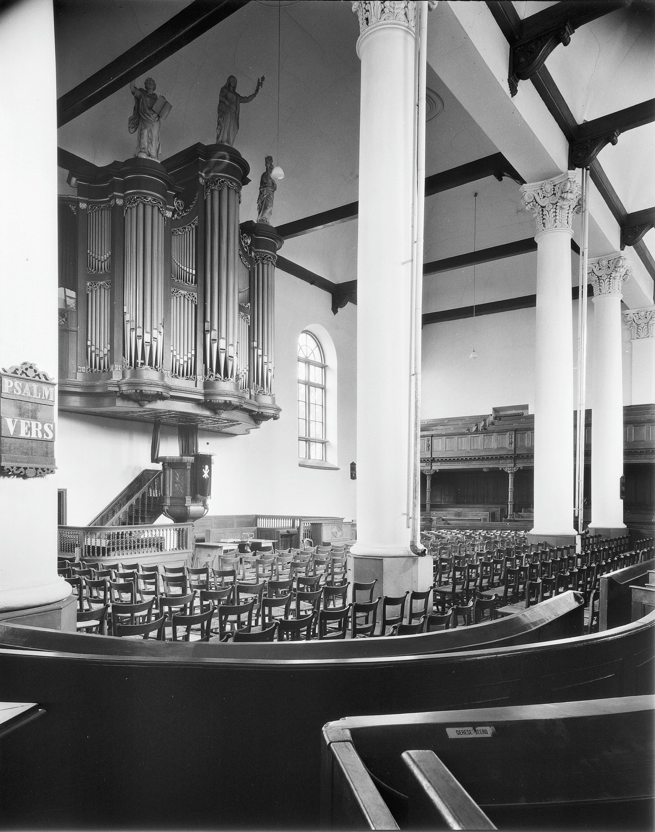 Westerkerk: interieur naar het noord-oosten